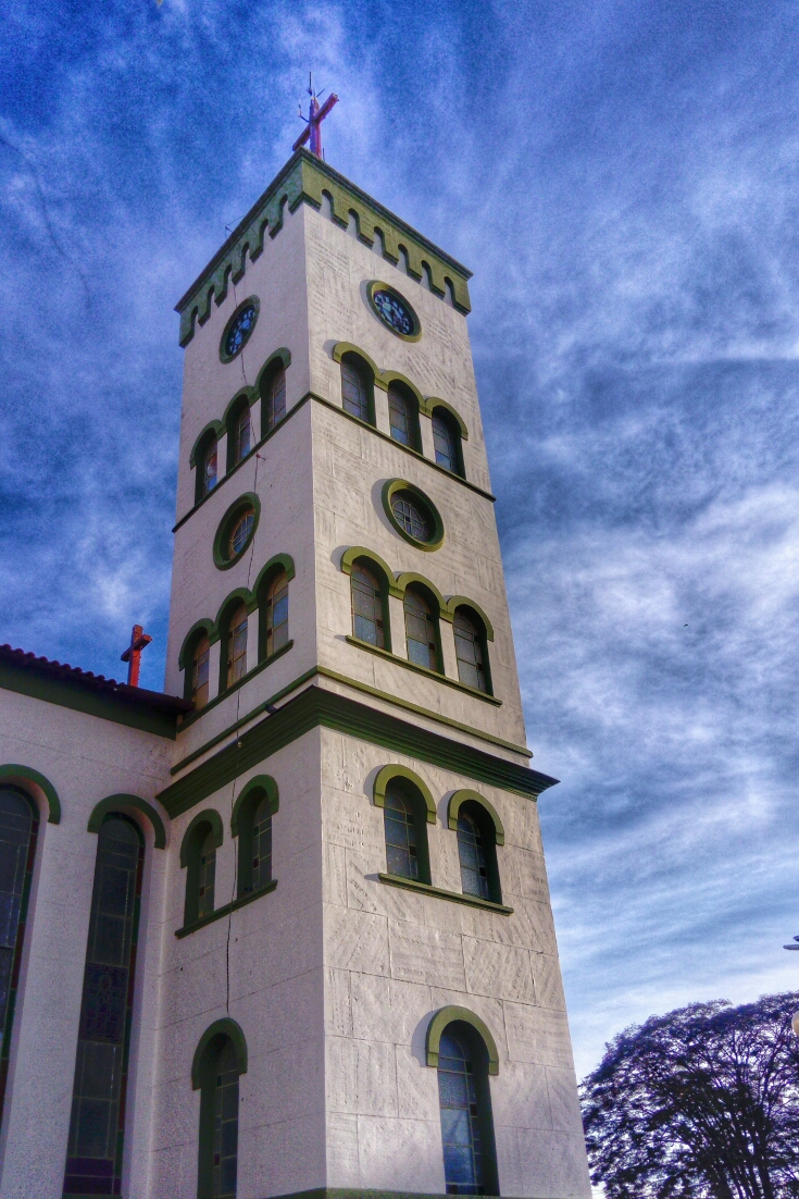 Torre da Igreja Matriz de Nossa Senhora da Conceição em Divisa Nova